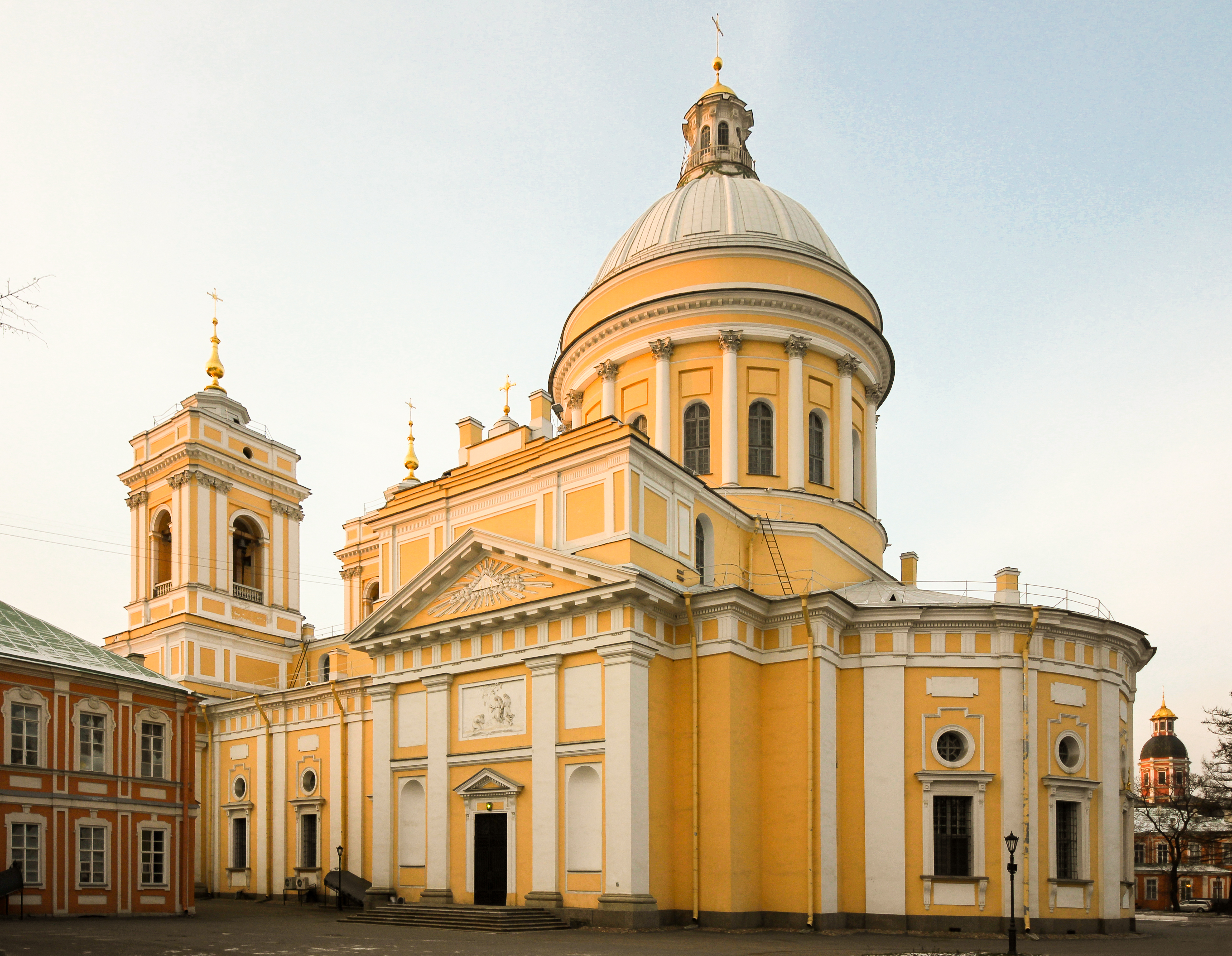 Троицкий собор с двумя соединительными флигелями: набережная р. Монастырки, 1, Центральный район, Санкт-Петербург